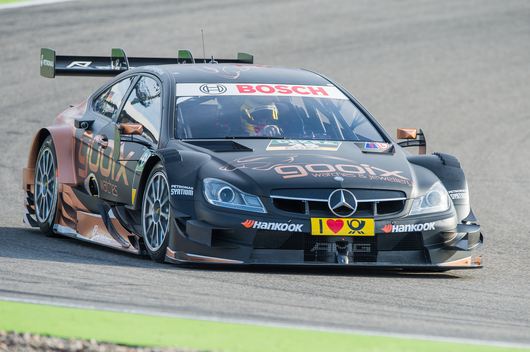 DTM,Deutsche Tourenwagen Masters,HWA AG,Hockenheimring,Motorsport,Pascal Wehrlein,gooix Mercedes AMG C-Coupe